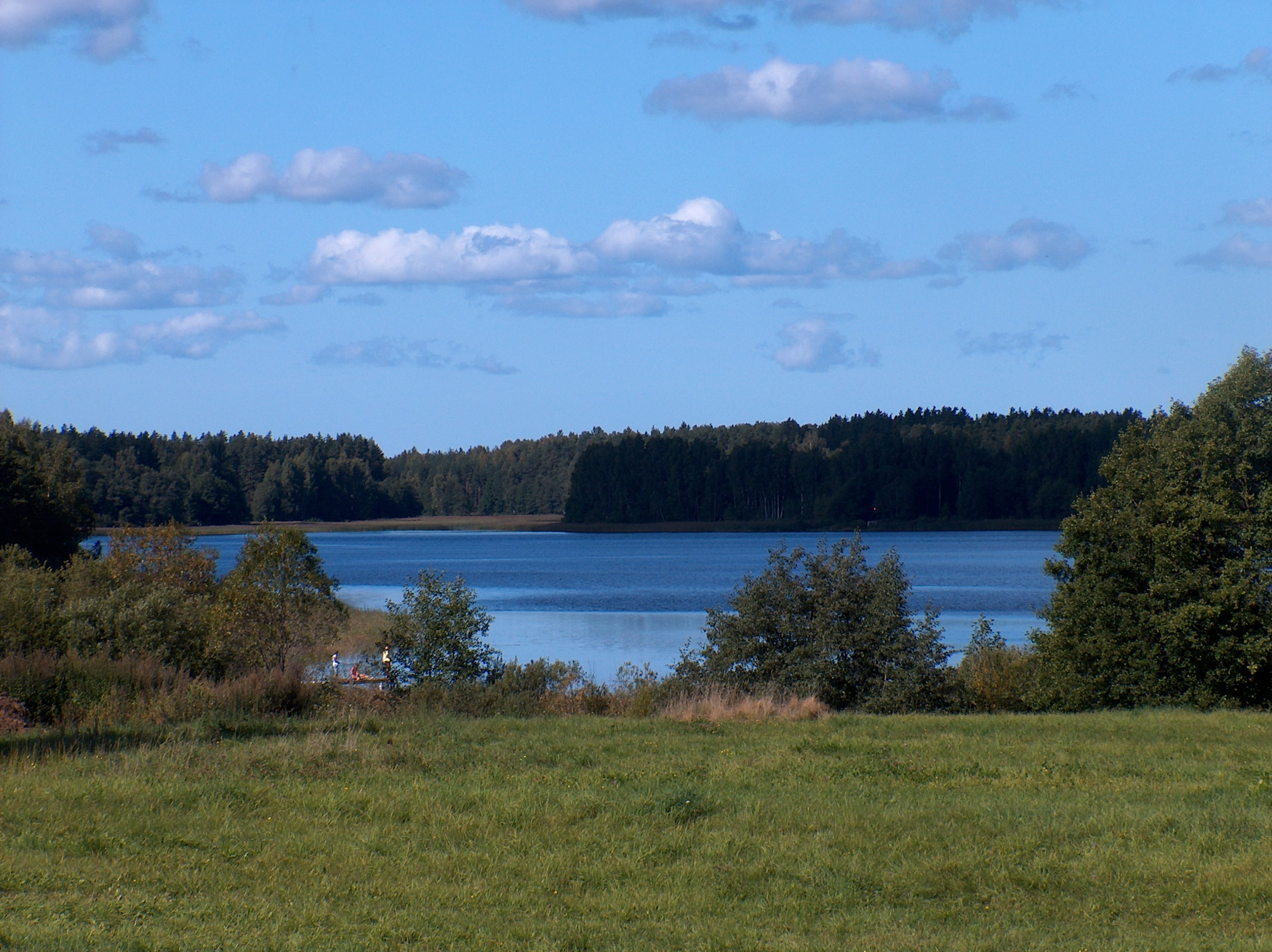 Spāres ezers